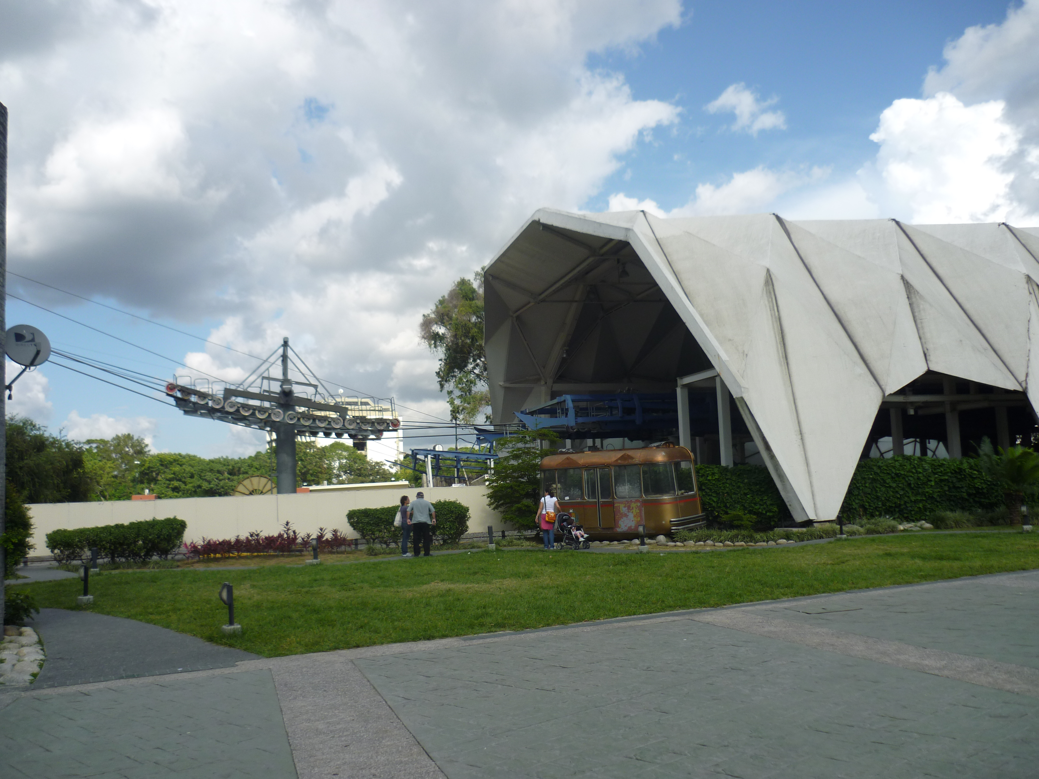 Estación Terminal Teleférico El Ávila